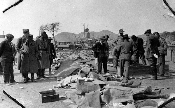 Ricognizione nel cantiere, i cadaveri sono sommariamnete ricoperti